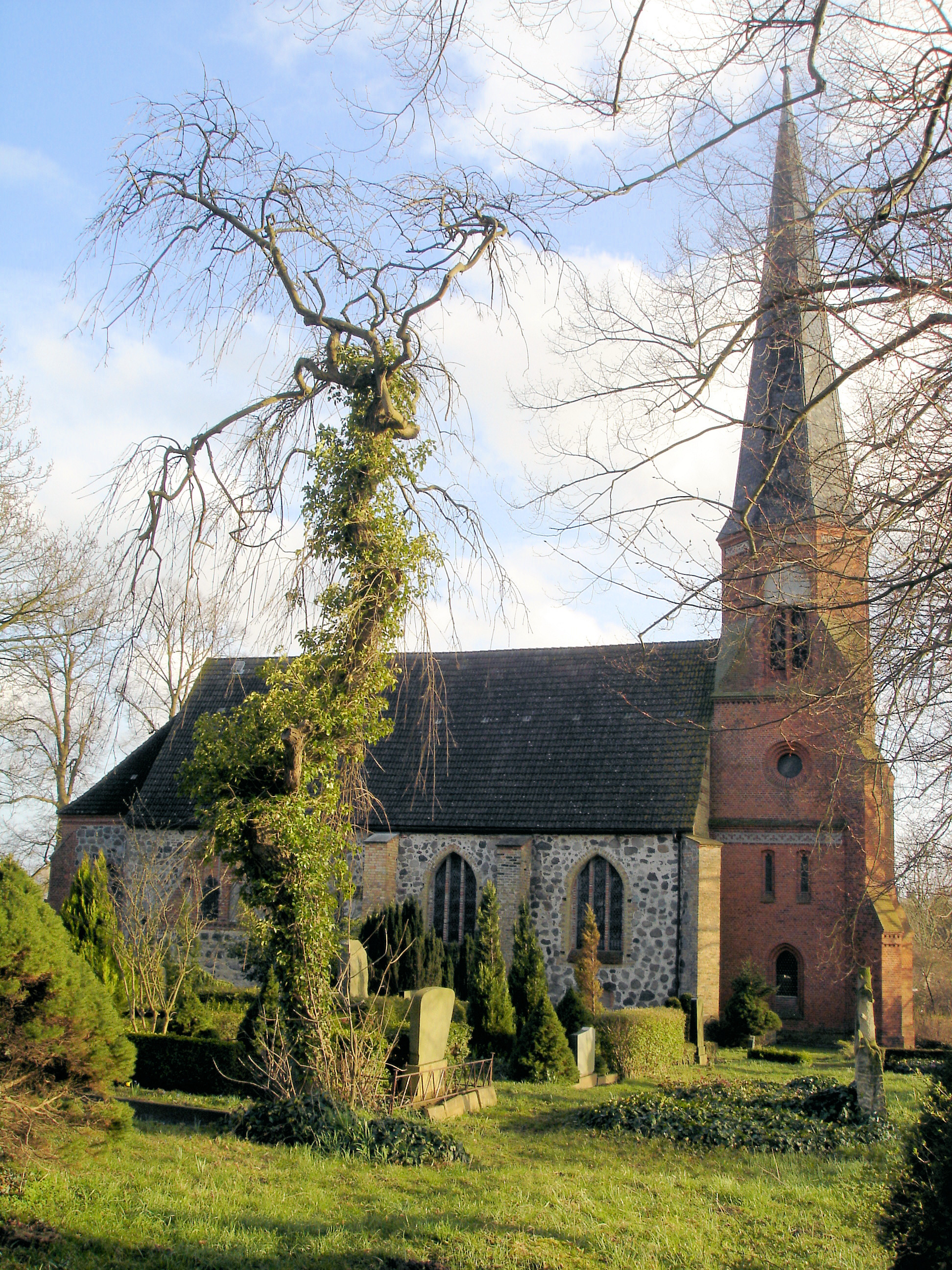 Kirche Volkenshagen / Church in Volkenshagen